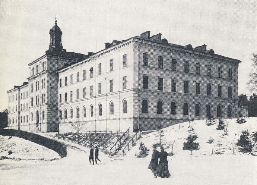 Manillaskolan på Djurgården, Stockholm